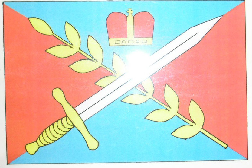 vlajka obce Suchonic